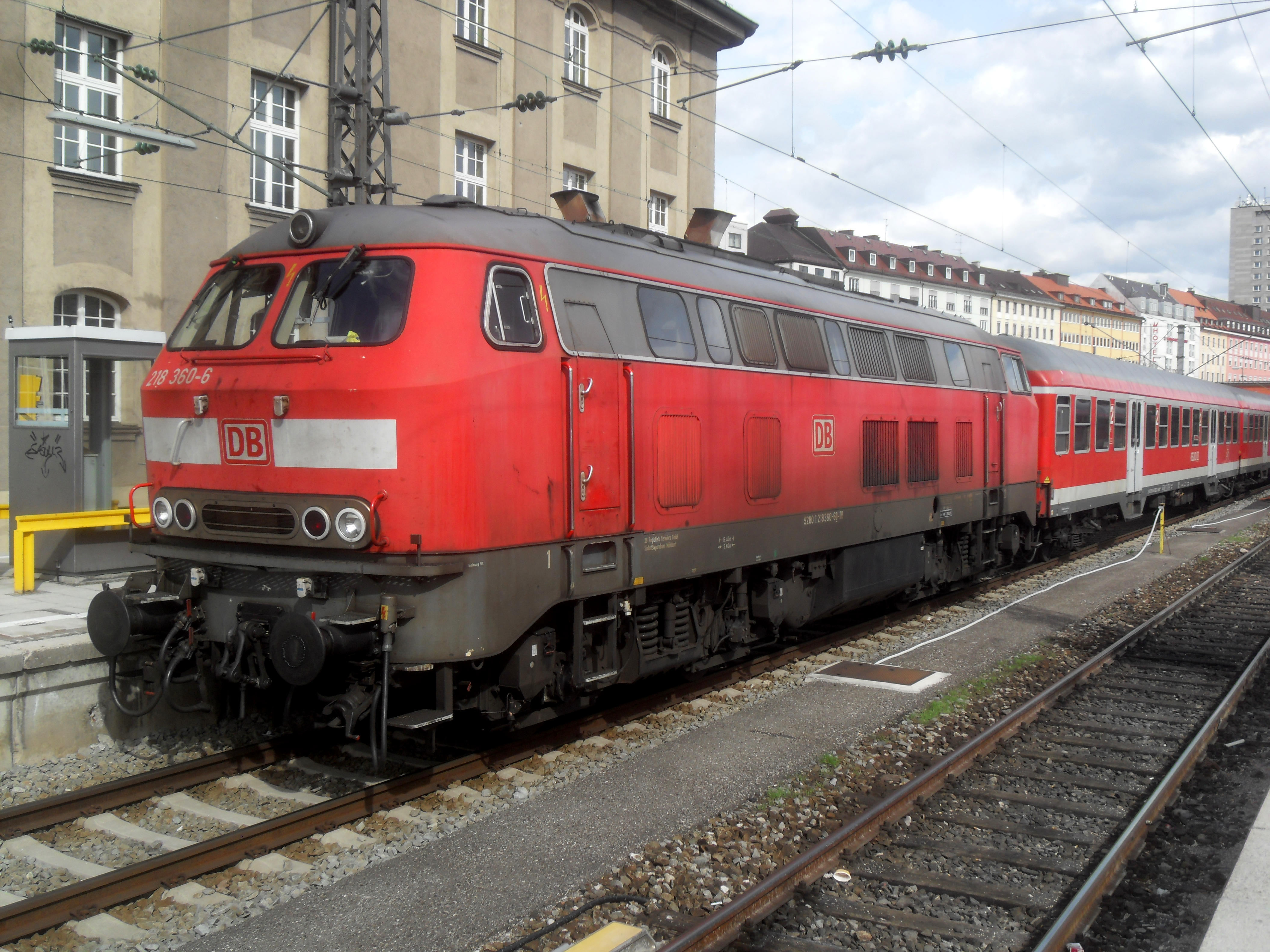 Regionalexpress mit Diesellokomotive der DB-Baureihe 218 auf dem Gleis 35 im Münchner Hauptbahnhof in Bayern (Deutschland) auf dem Weg nach Kaufbeuren über die Allgäubahn